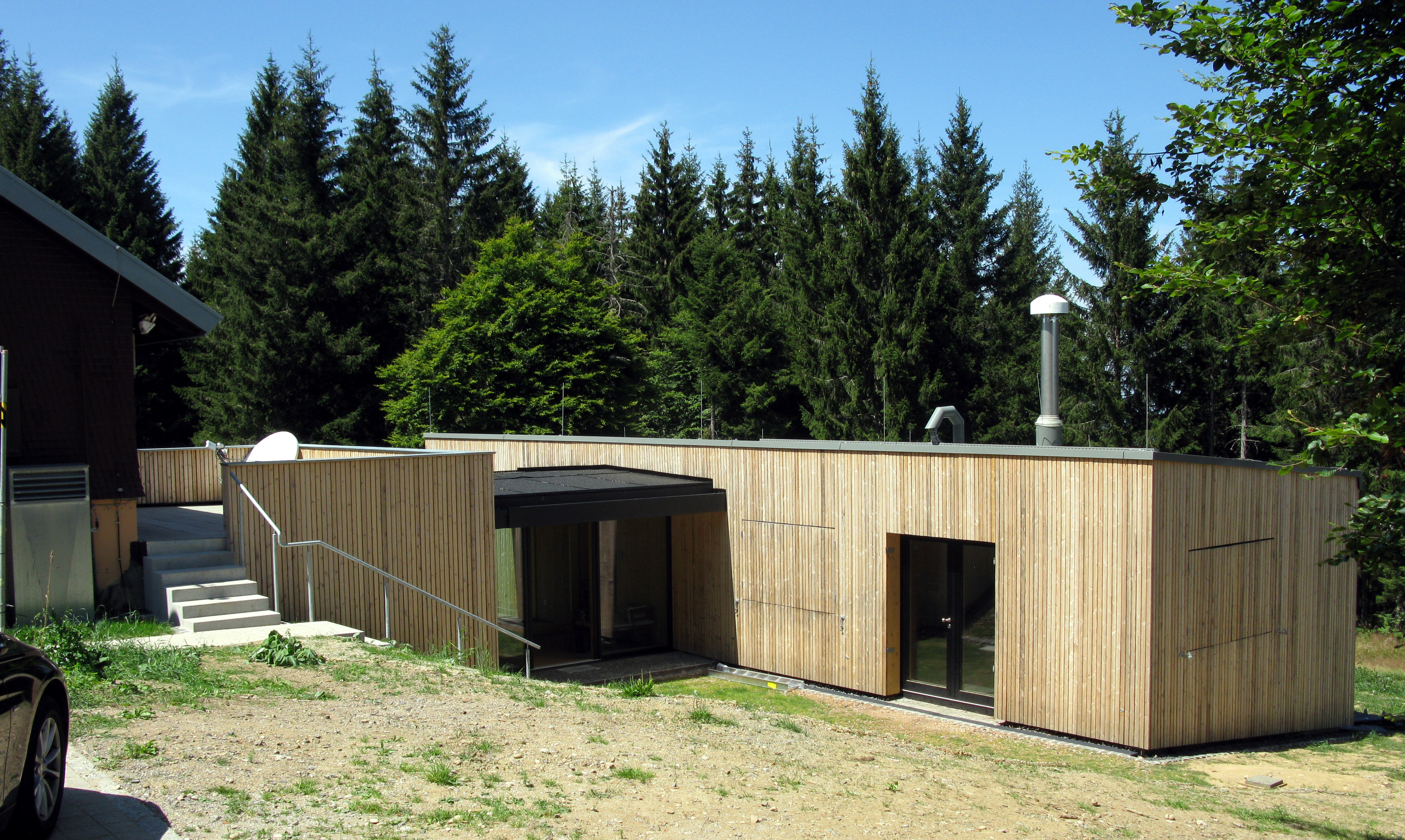 Bundesamt für Strahlenschutz, neues Messgebäude mit Weißtannenholz verkleidet auf dem Schauinsland, am linken Bildrand das Hauptgebäude